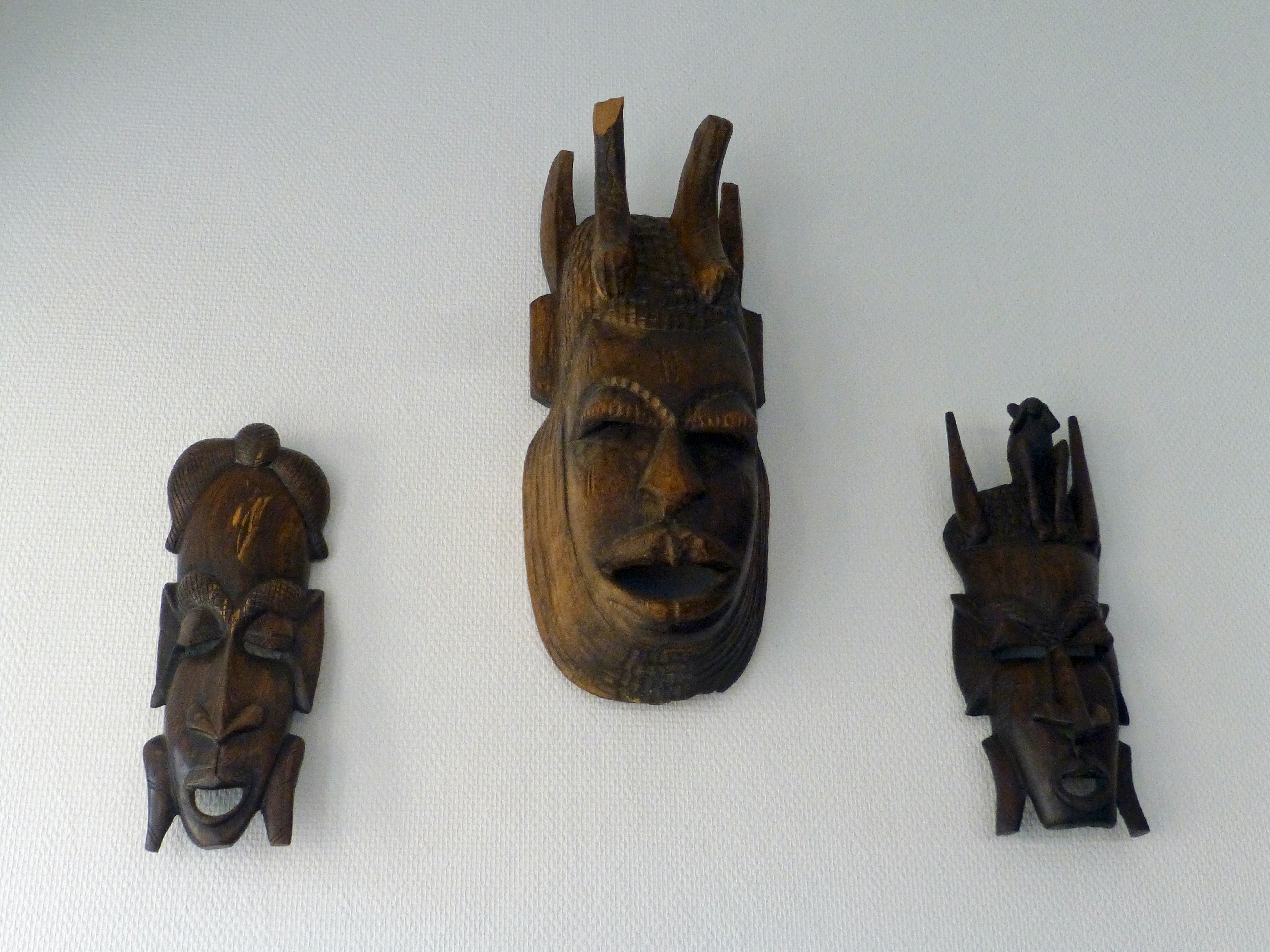 Musée africain de Gunsbach (Haut-Rhin) : masques du Gabon